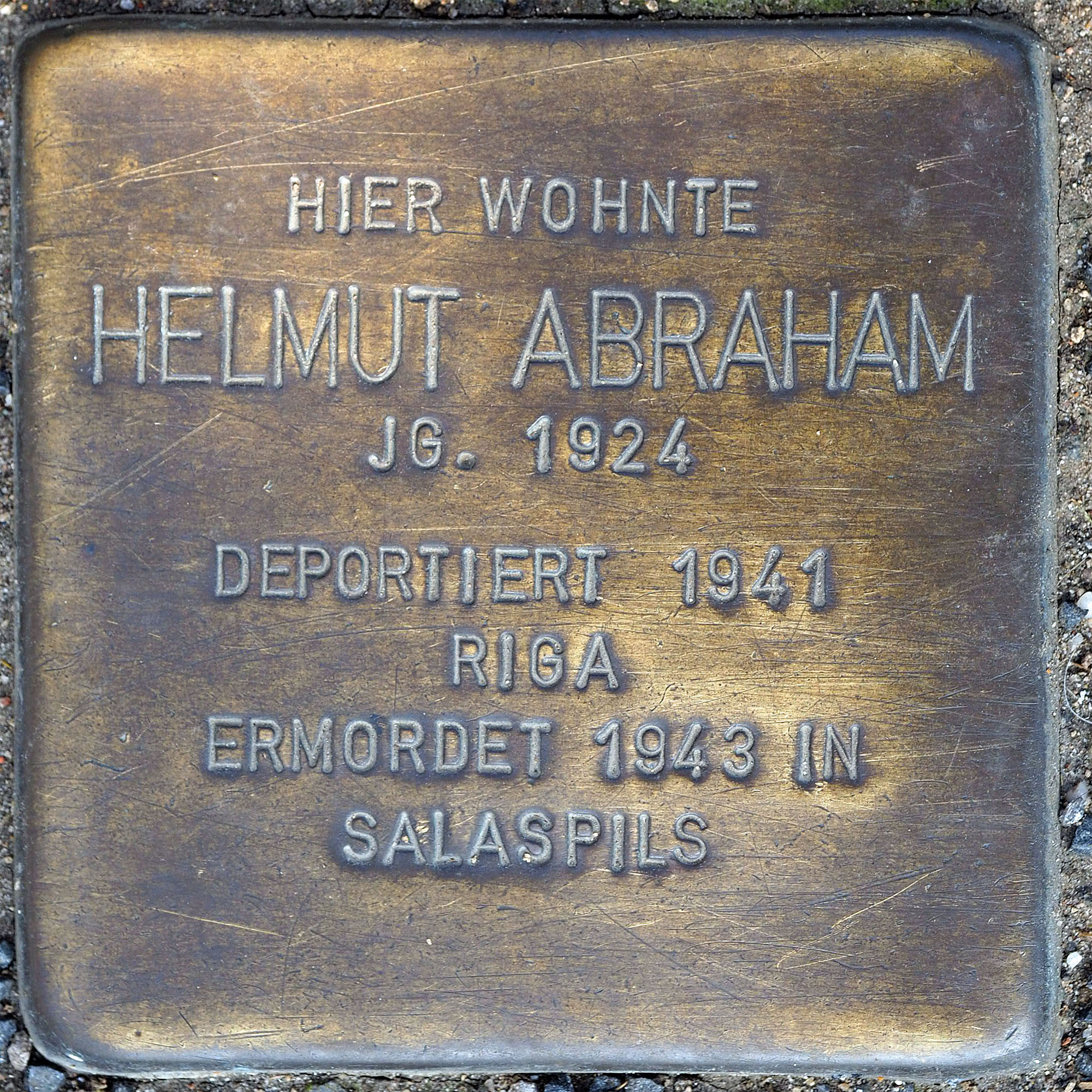 Stolpersteine MG: Abraham, Helmut